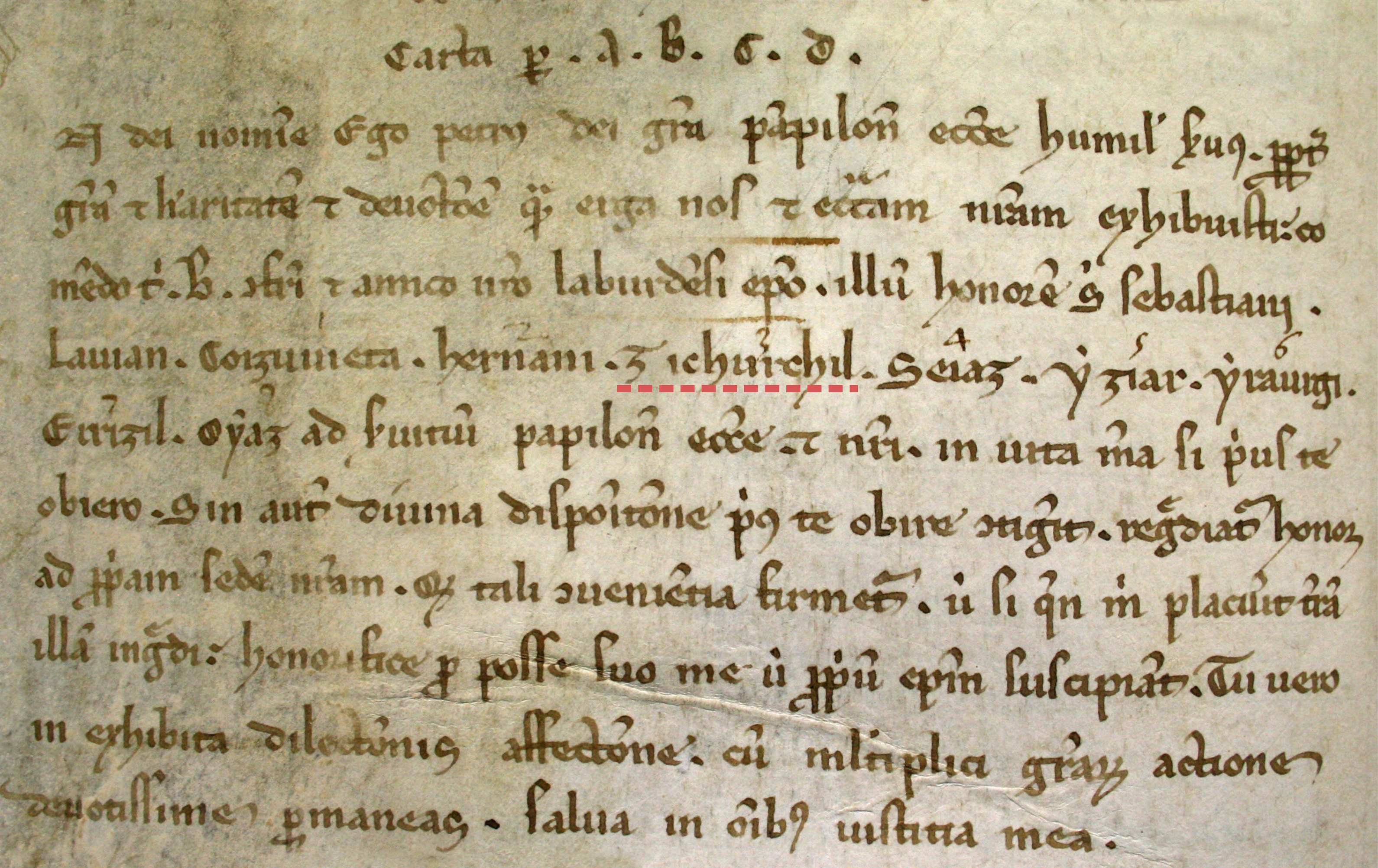 Zichurchil herriaren izenaren lehen aipamena. Iruñeko Katedraleko Artxibategia, Libro redondo,Códice 64, fol. 104V